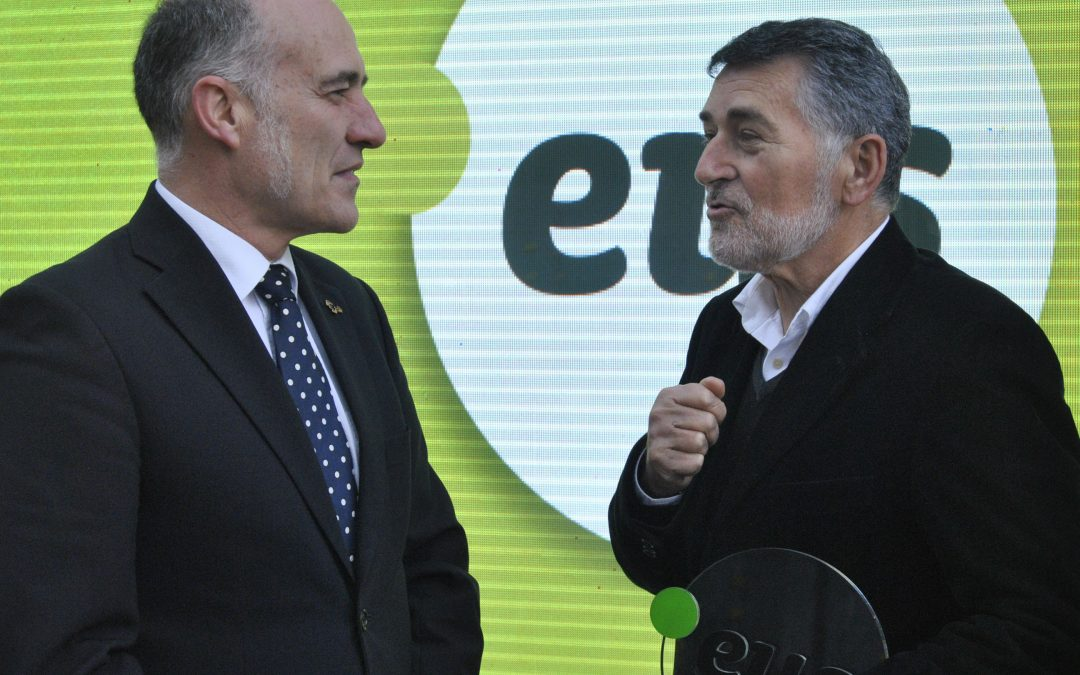 Joan Mari Torrealdai eta Iñaki Goirizelaia PuntuEUS Fundazioko lehendakariak. 2017an